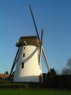 moulin